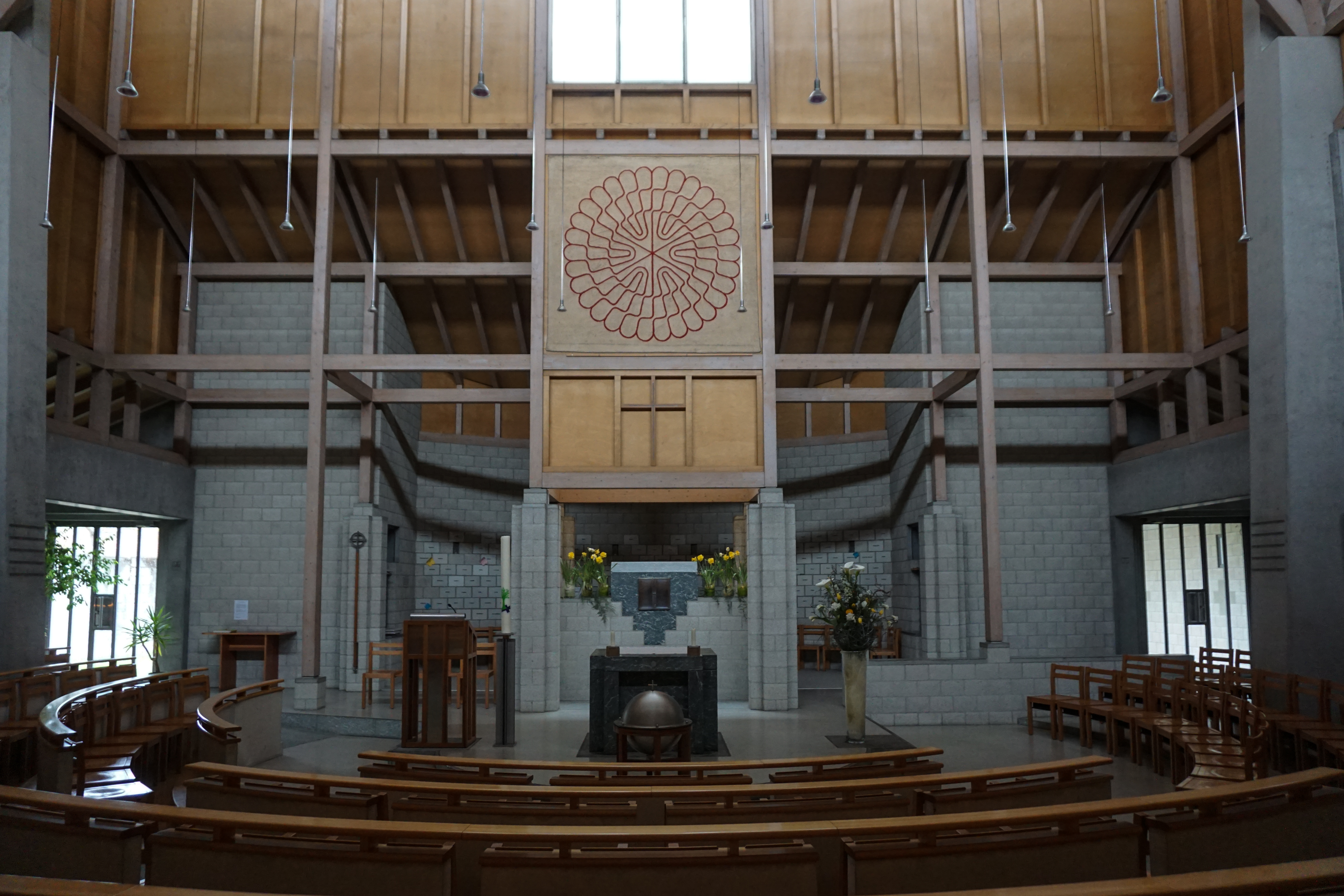 St. Mauritius, Altar frontal